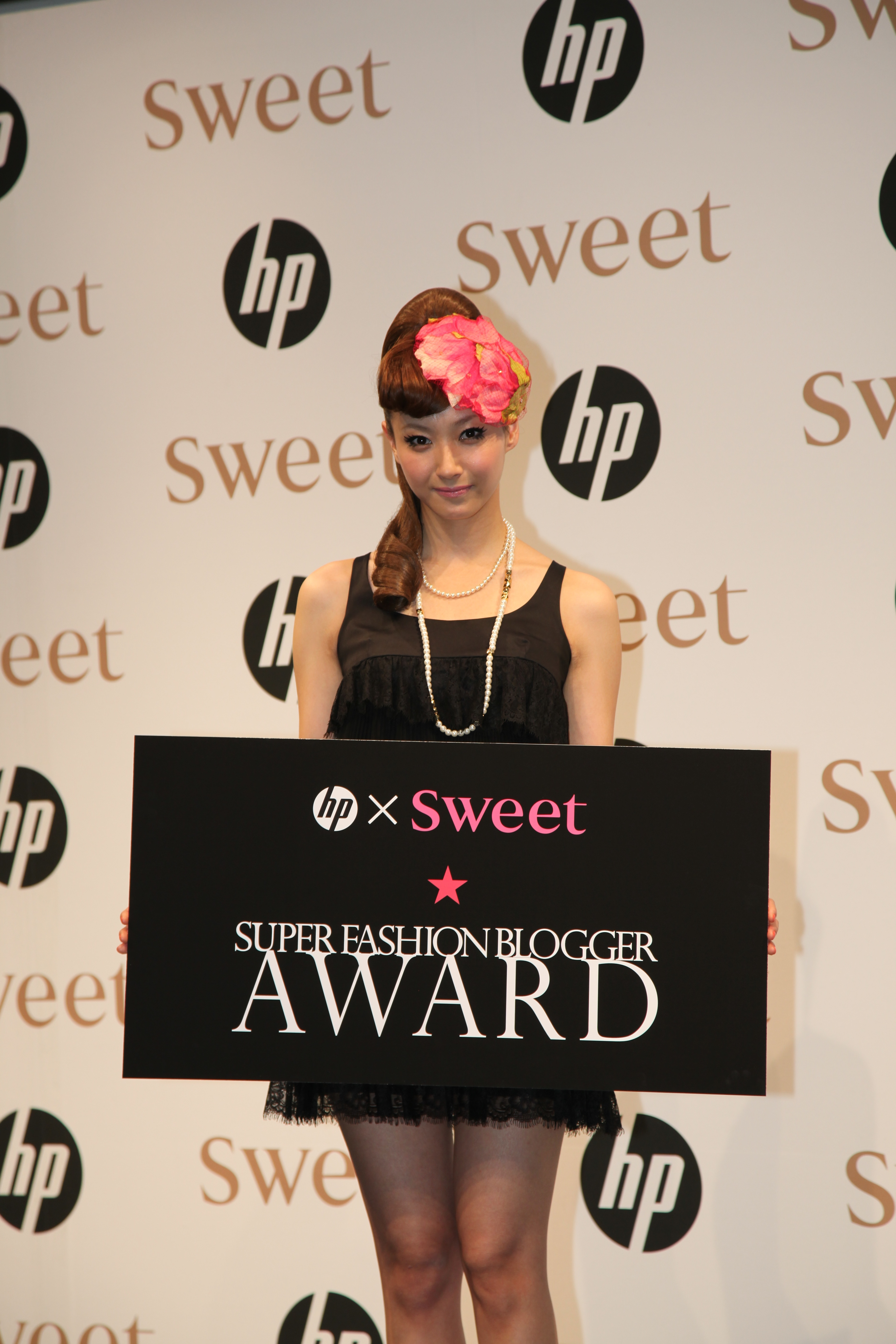 hp x Sweet スーパーファッションブロガープロジェクトの藤本美貴